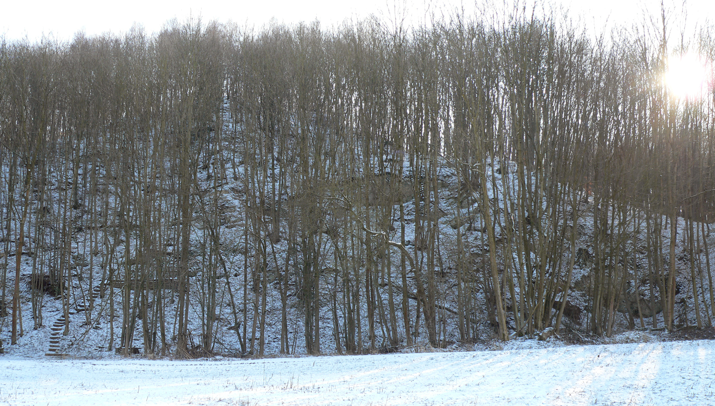 Eingang der Lichtensteinhöhle am Hangfuß links oberhalb der Treppe